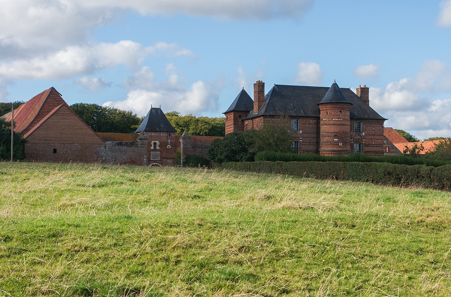 Ferme de la Valouine, (Classé, 1930)